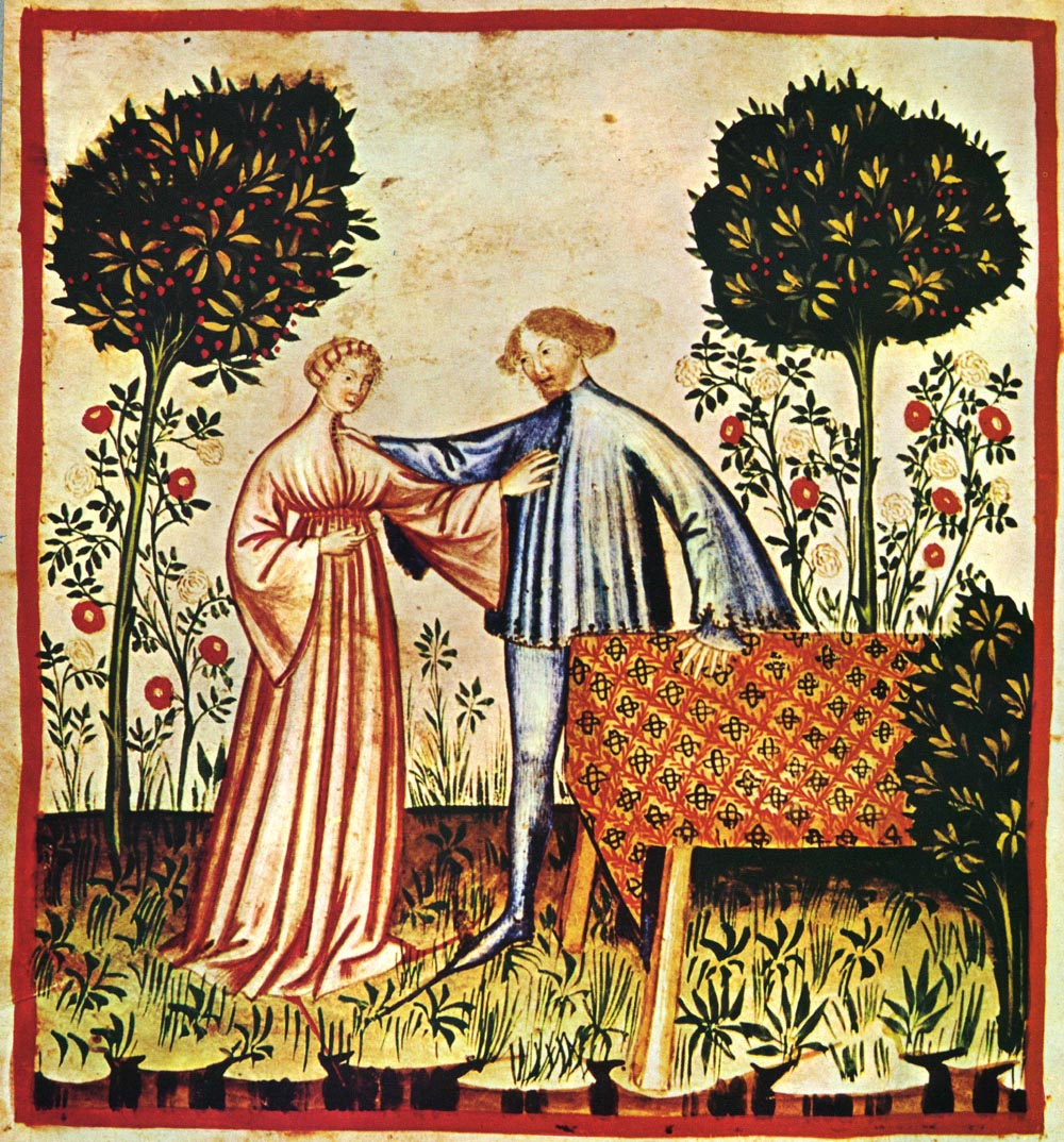 Tacuina sanitatis (XIV century) 5-aspetti di vita quotidiana, gioia,Taccuino Sanitatis, Cas